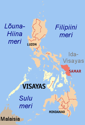 Samari saar